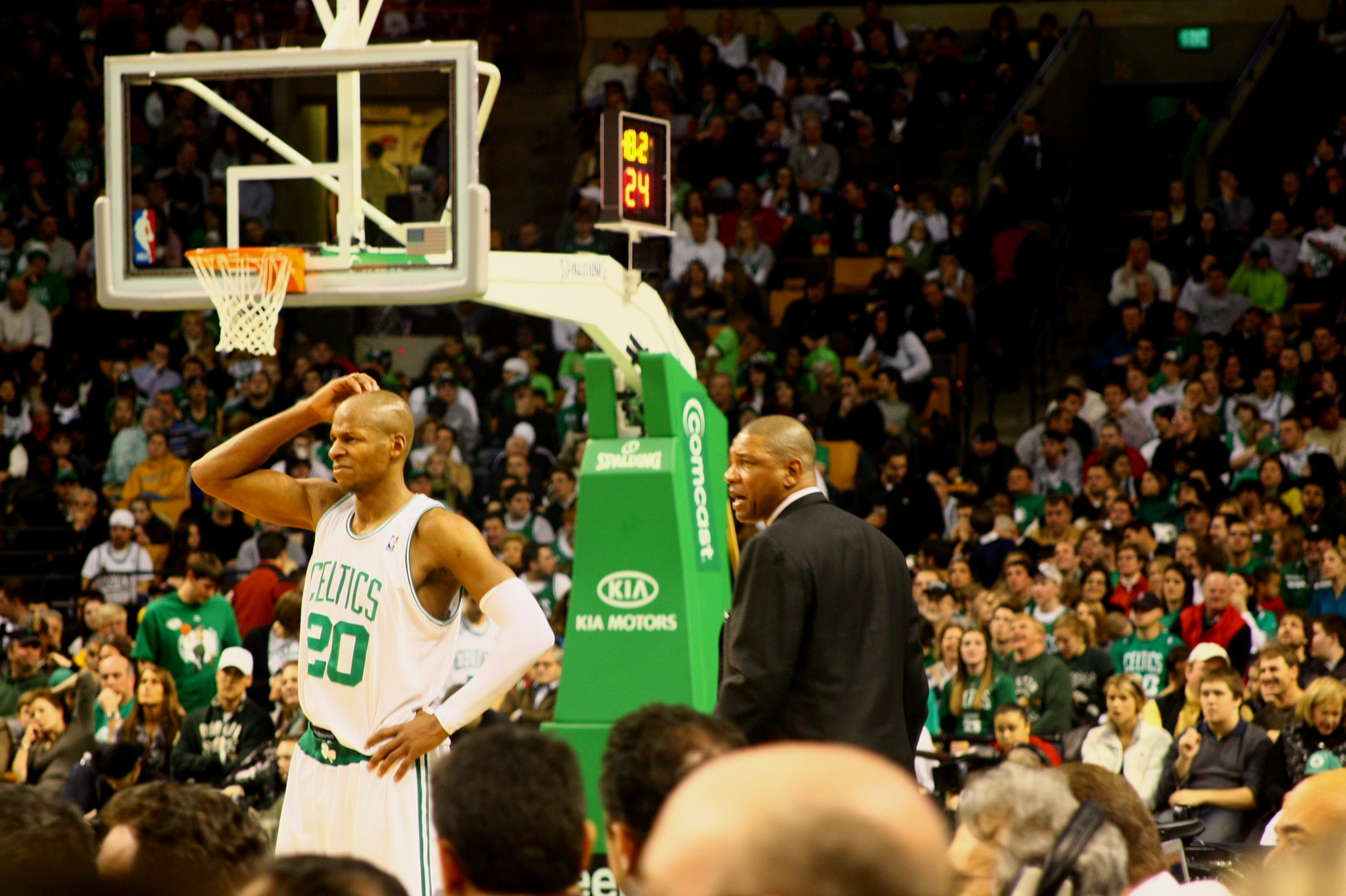 Doc Rivers et Ray Allen au Garden de Boston